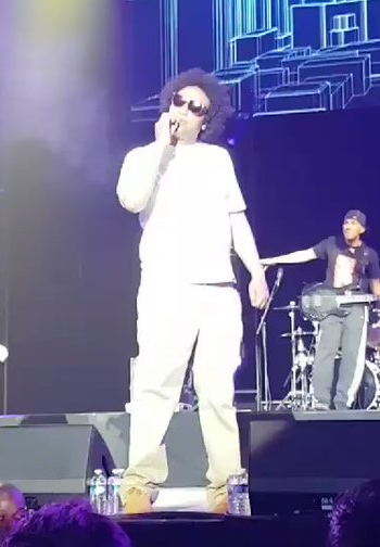 Doc Gynéco sur la scène de Paris-Bercy lors du concert événement du Secteur Ä en 2018.